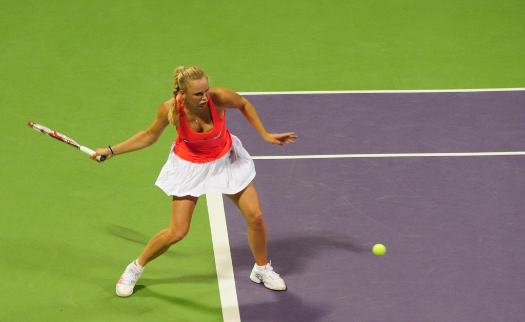 Caroline Wozniacki. Doha, February 26, 2011.